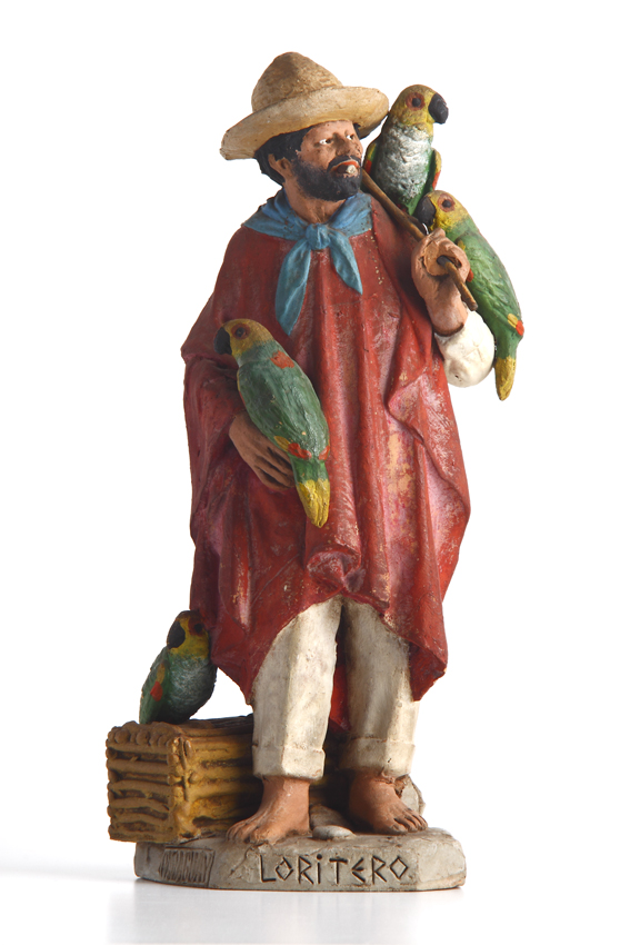 Loritero ; Obra do esculor Serafin Marsal